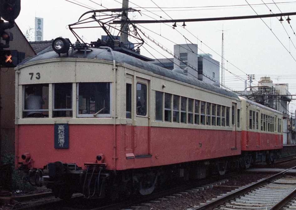 高松琴平電鉄 73（後は60形62）